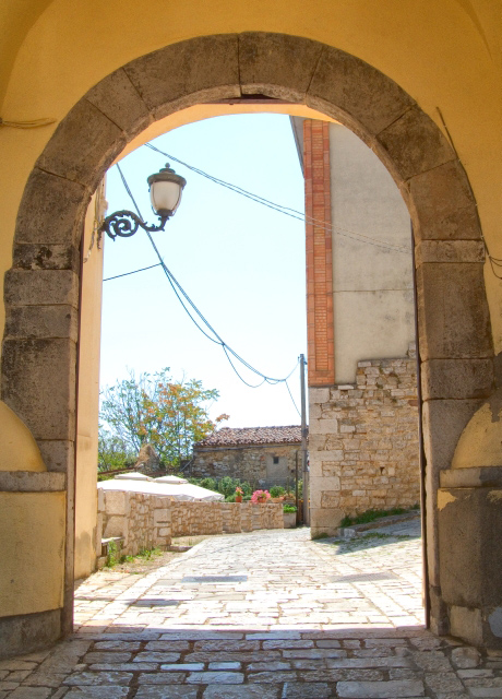 Porta Ranna, uno dei due accessi al centro storico di Molinara (BN).